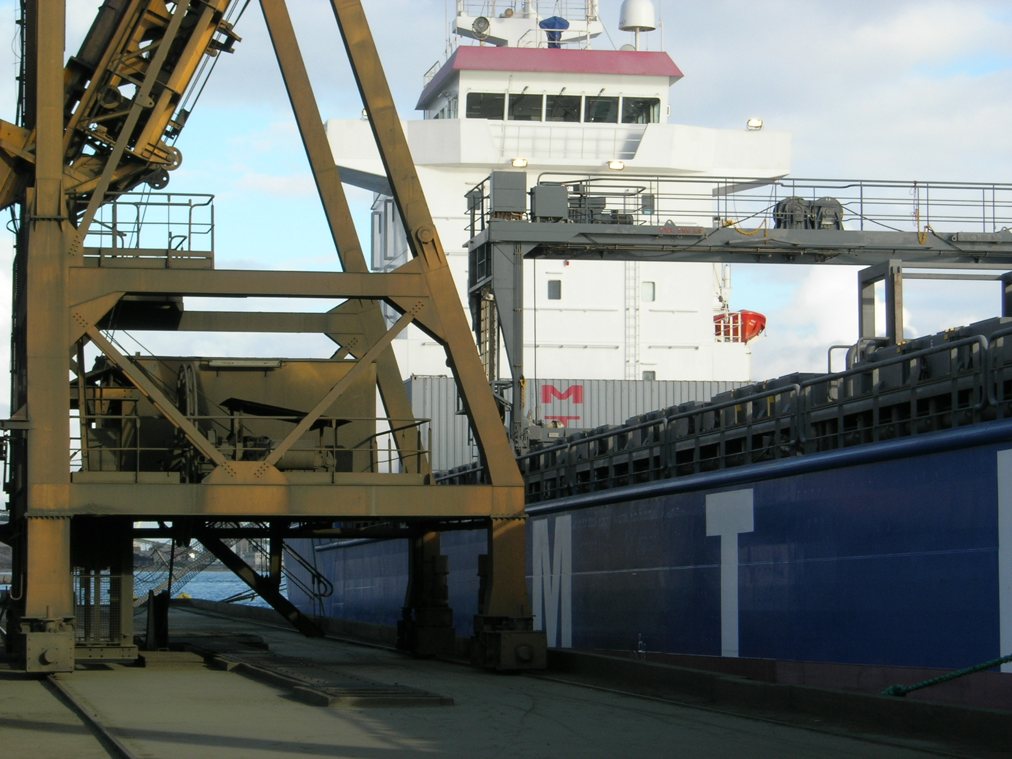 MV Vasadiep - General cargo Ship